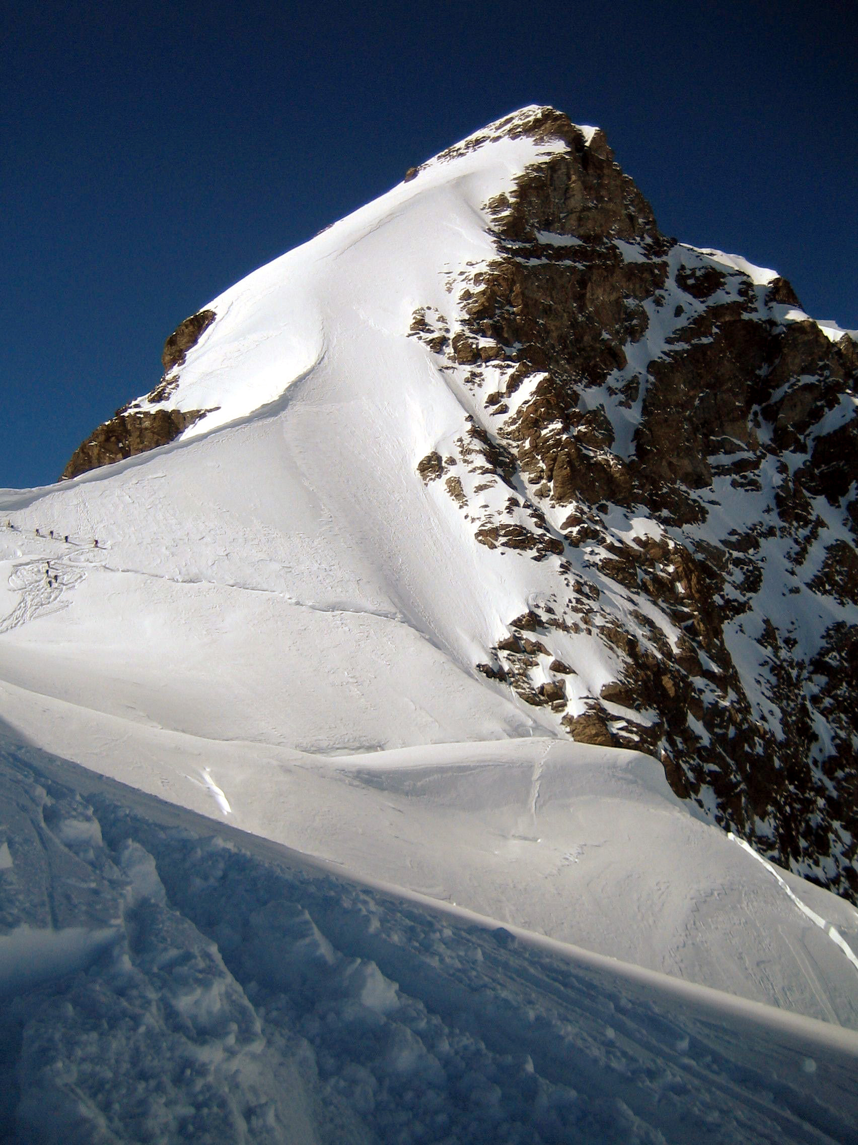 Jungfrau, Aufstieg vom Skidepot